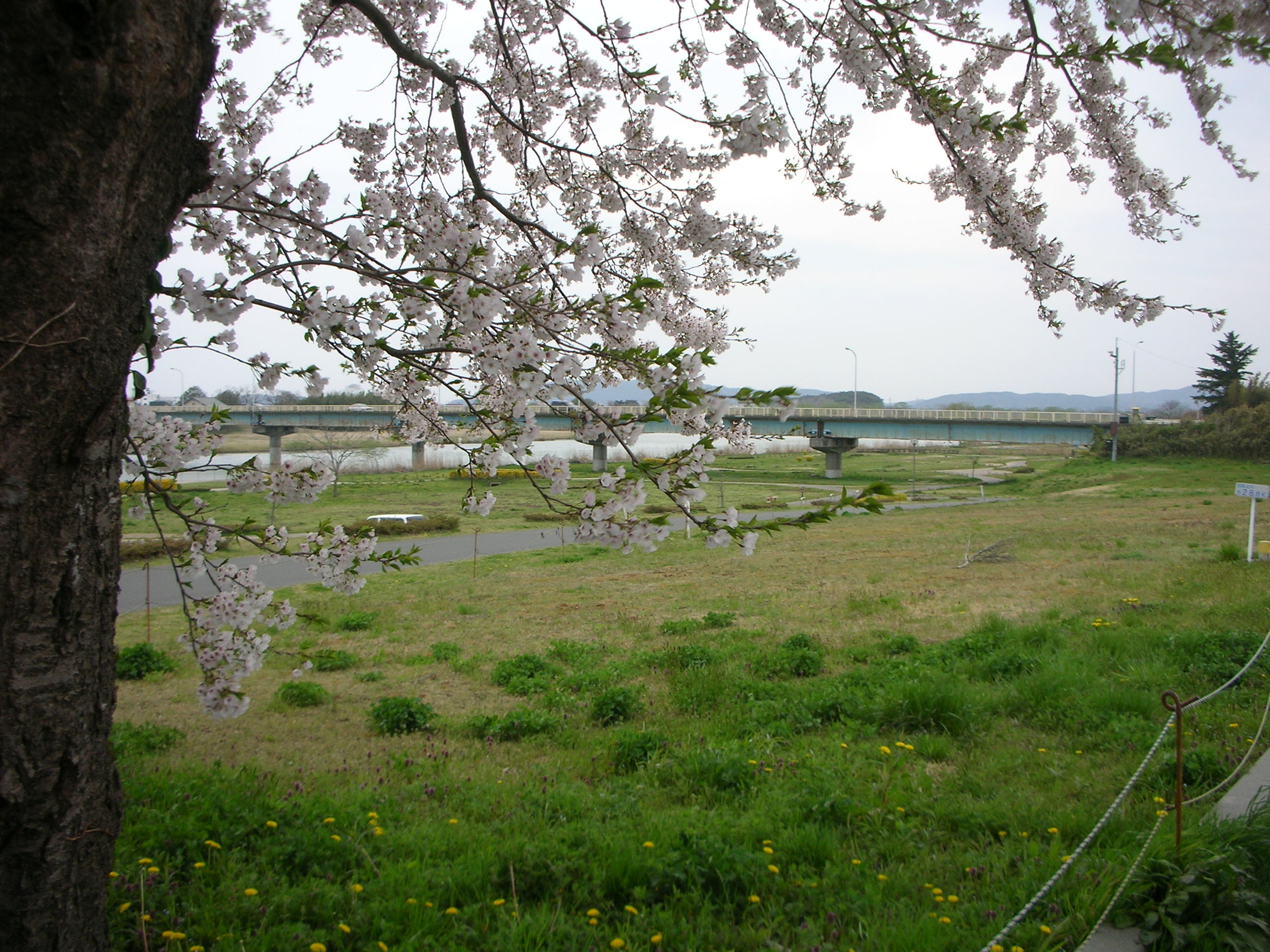 豊里水辺の公園